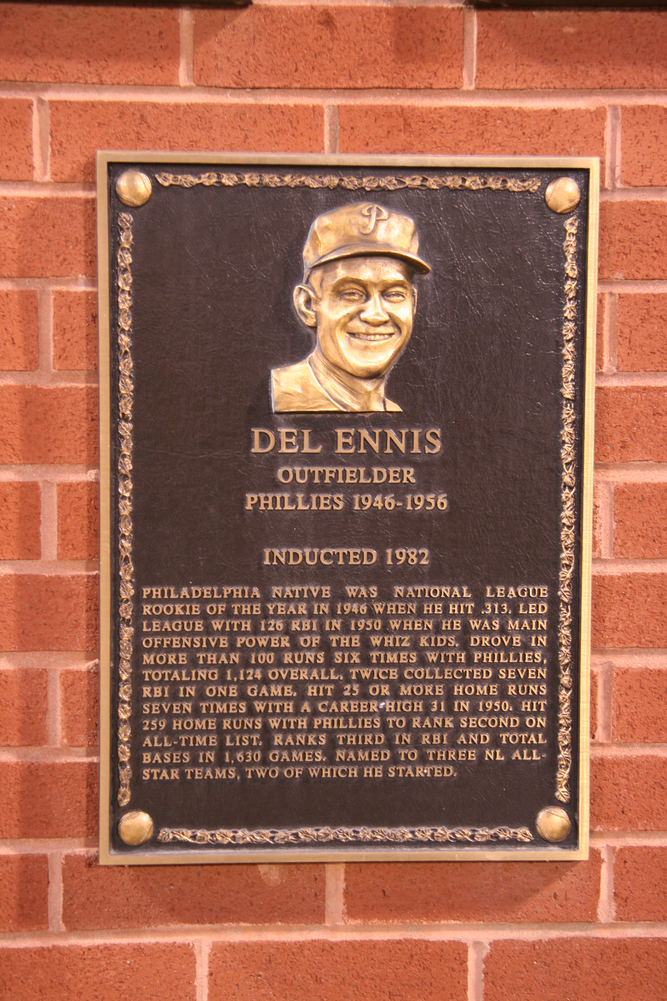 Del Ennis